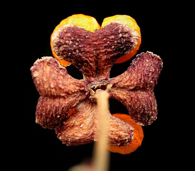 Euonymus europaeus